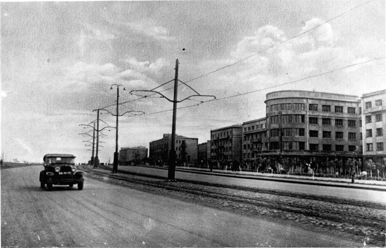 1930-е. В районе Студгородка